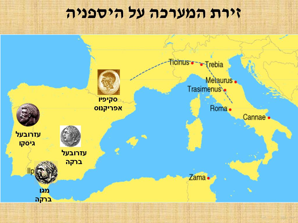 תיאור פריסת כוחות קרתגו בחצי האי האיברי, ערב הגעתו של סקיפיו אפריקנוס, הקונסול הרומאי אשר נשלח כדי להשיג שליטה מחודשת באי